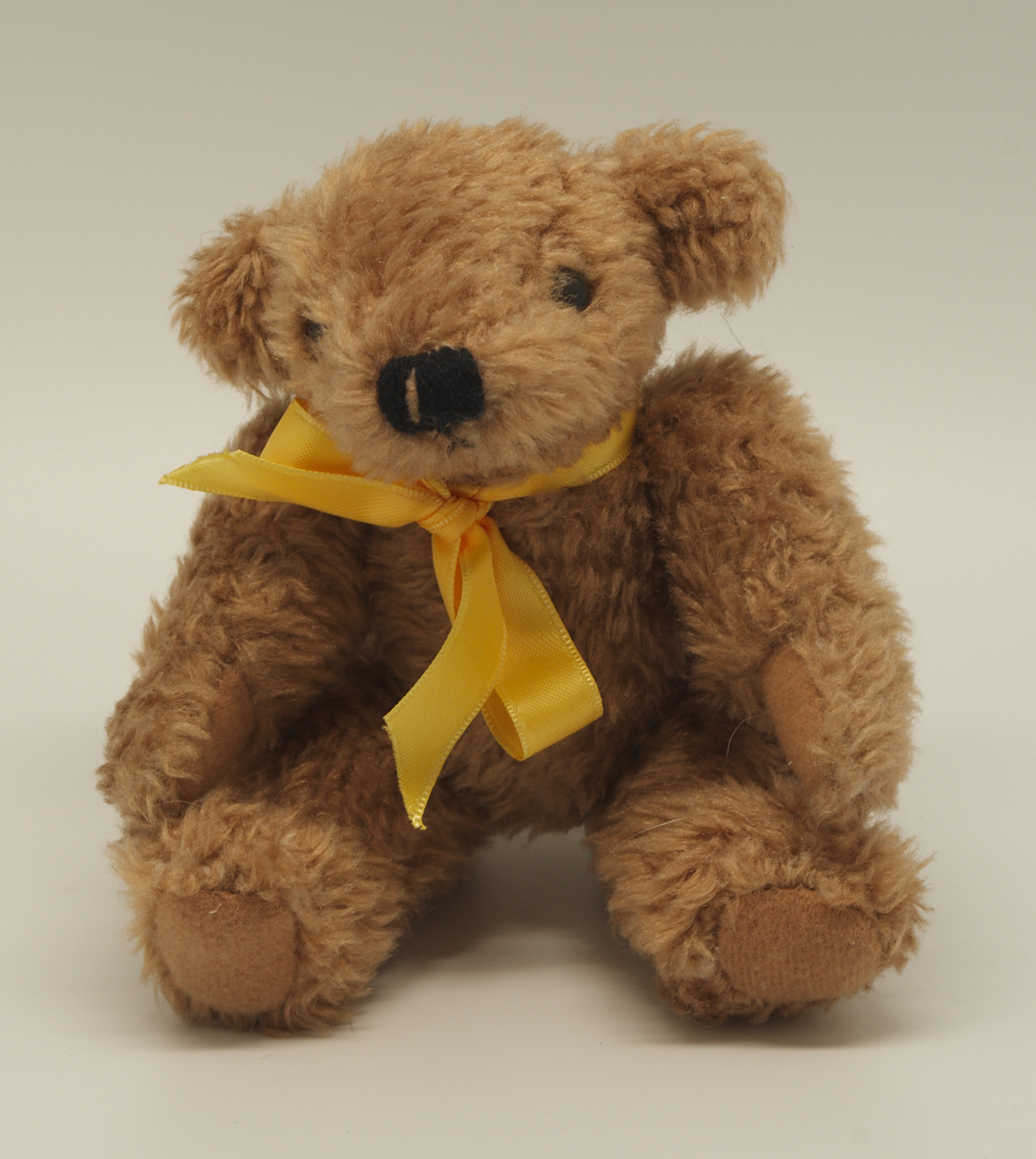 Ours en peluche